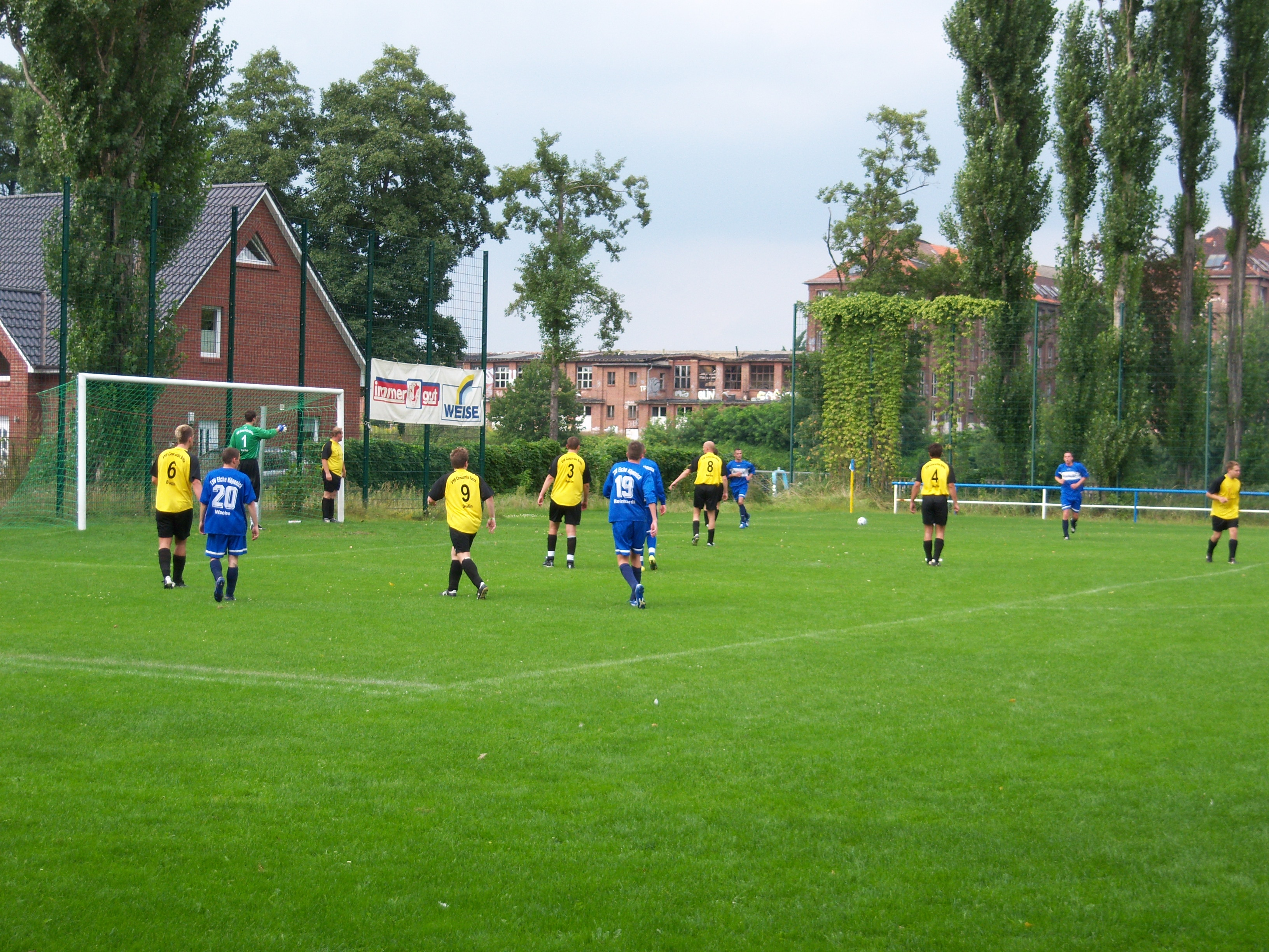 Spiel der ersten Herren des TSV Eiche Köpenick im Sommer 2007